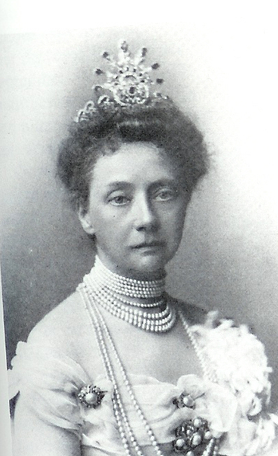 Foto van prinses Elisabeth van Saksen-Weimar-Eisenach (1854-1908); foto waarschijnlijk gemaakt in haar trouwjaar 1886. Eventueel berustende auteursrechten verlopen. Afbeelding komt in meerdere publicaties voor. Deze versie gevonden op alwaar het zonder auteursrechten gekopieerd mag worden.